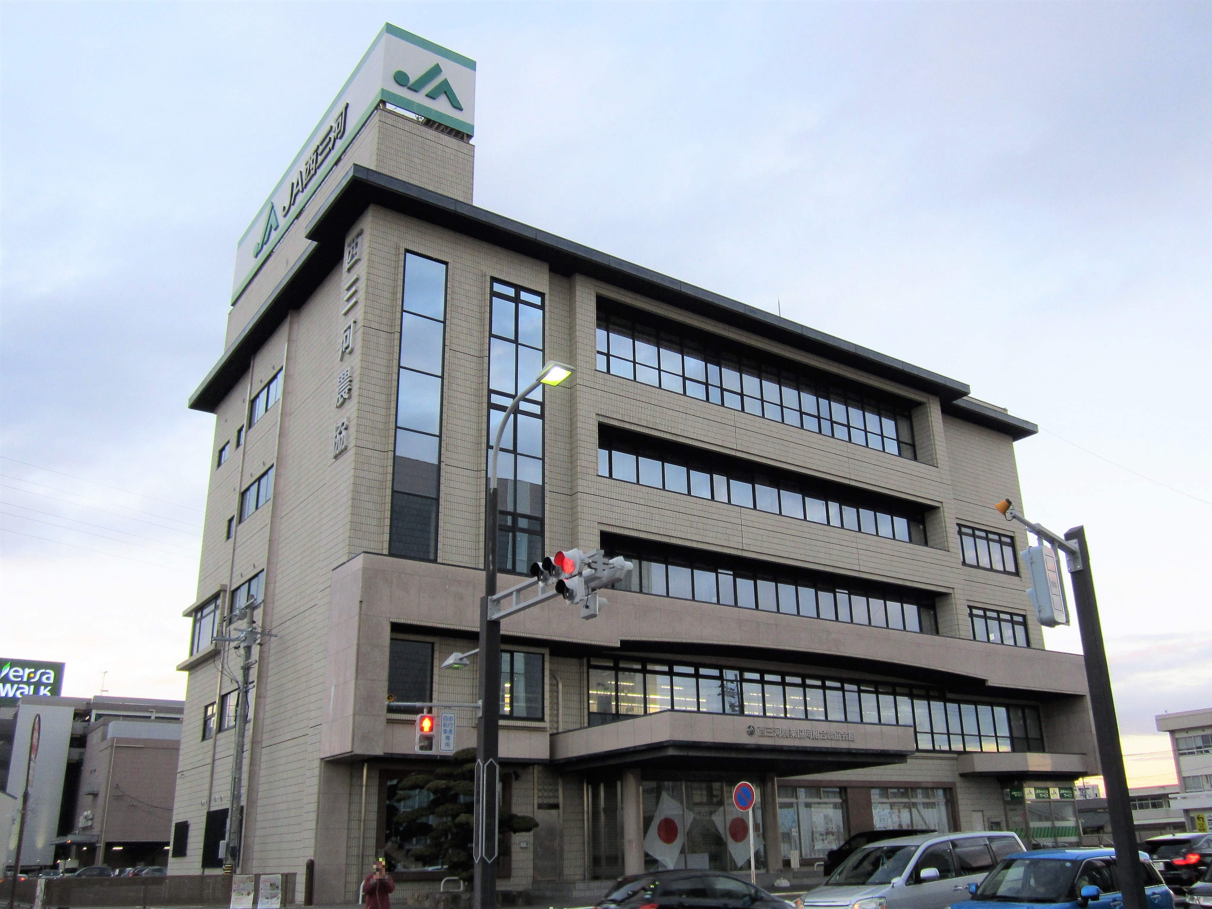 西三河農業協同組合 本店・西尾支店（西尾市寄住町下田） Canon PowerShot A2200